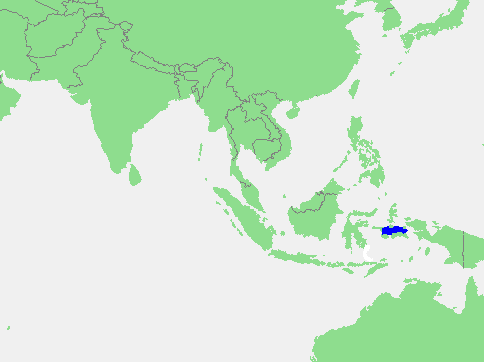 Ceram Sea